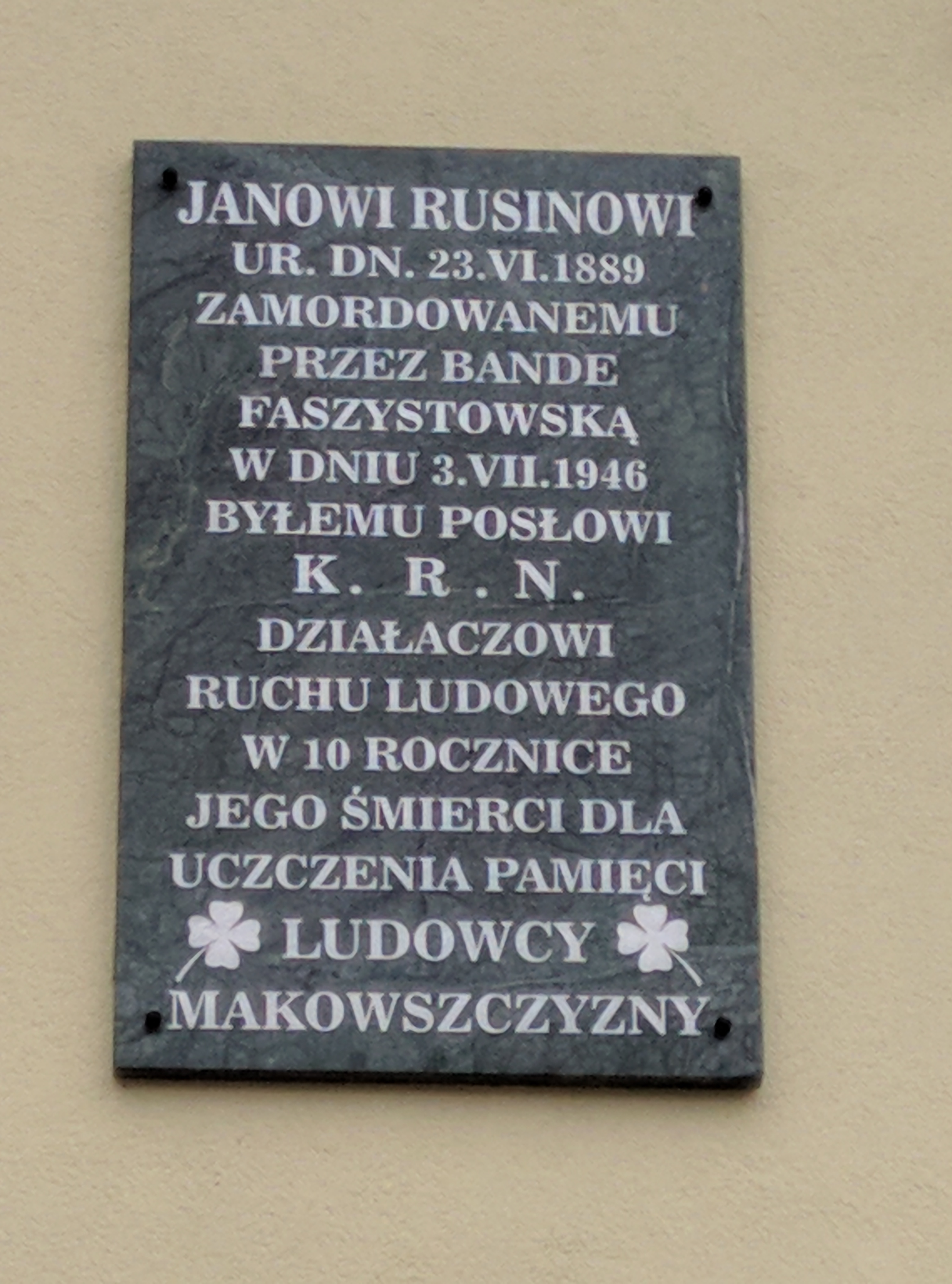 Tablica upamiętniająca Jana Rusina w rodzinnej wsi Bieńkówce w remizie OSP Bieńkówka